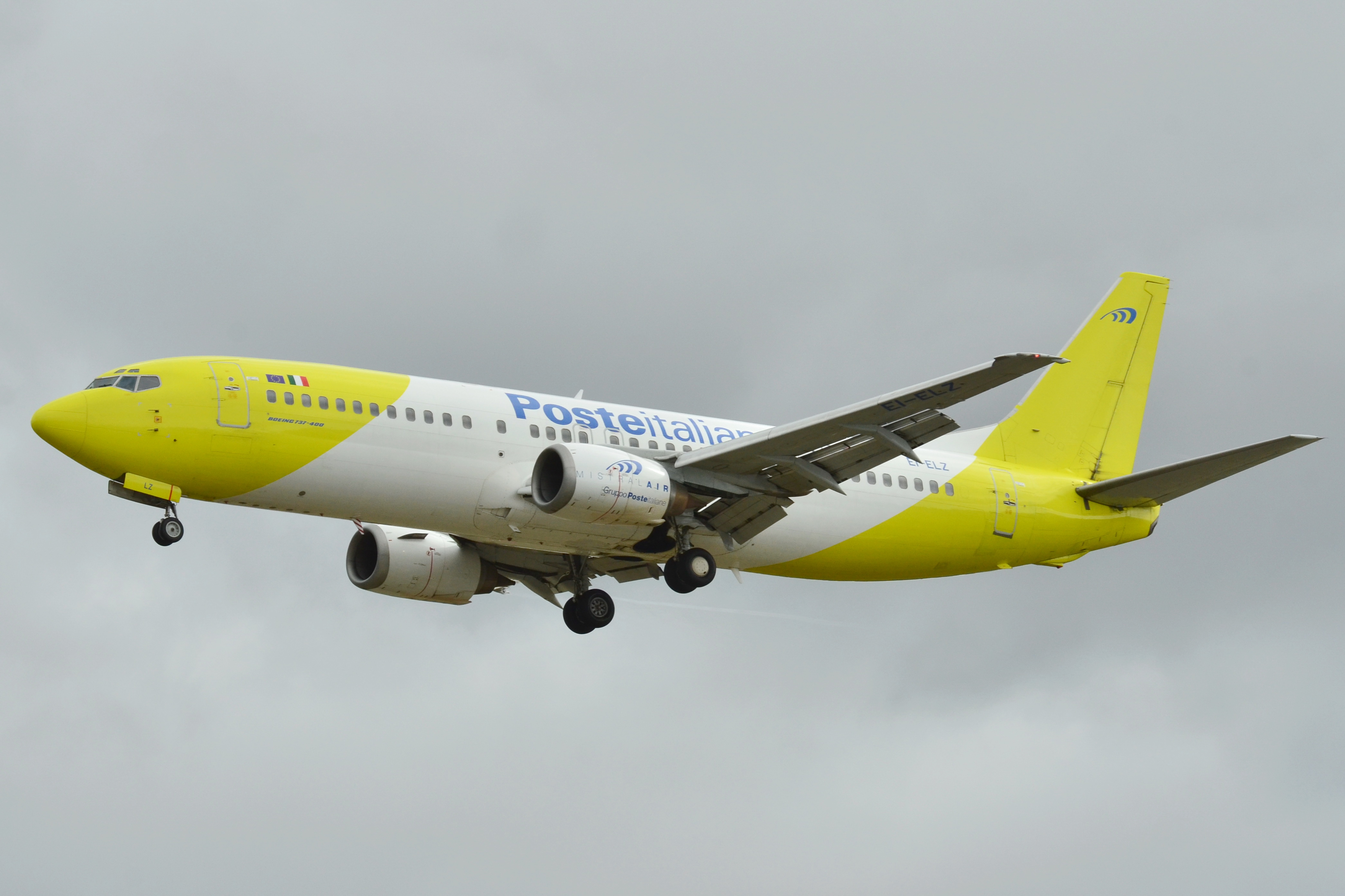 Photo prise à l'aéroport de Toulouse-Blagnac (LFBO) en France. Picture take at Toulouse-Blagnac Airport (LFBO) in France.